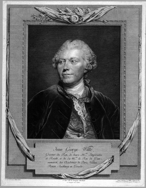 P. par J. B. Greuse, Peintre du Roi. Gravé a Paris par J. G. Müller, Graveur du Roi, et Pension. de S. A. S. Mgr. le Duc regn. de Württemberg 1776